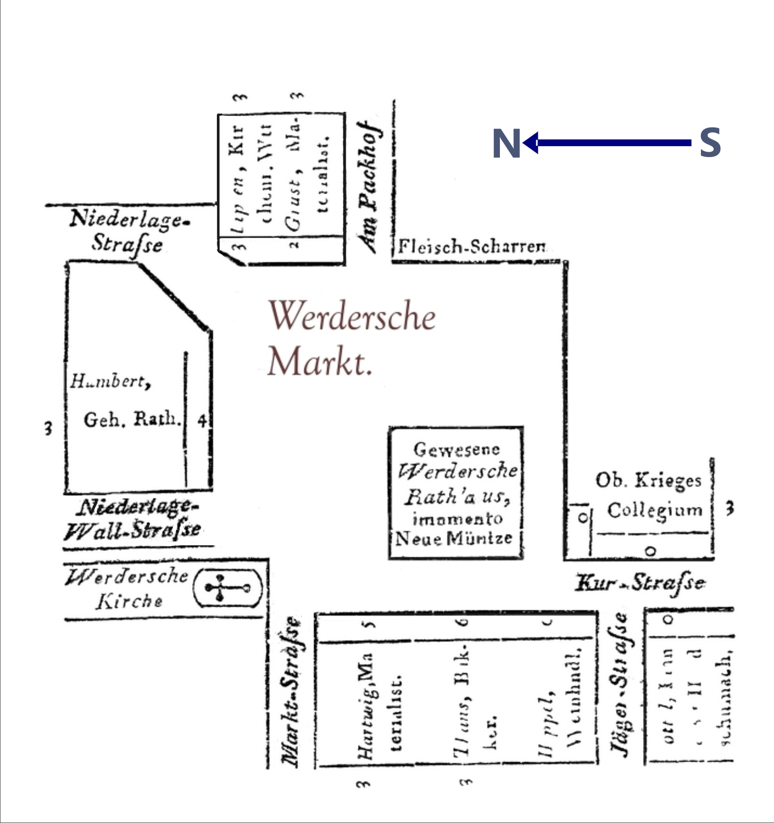 Werderscher Markt anno 1799; nachträglich genordet